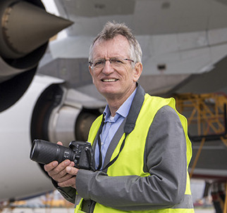 Dietmar Plath vor einer Emirates A380